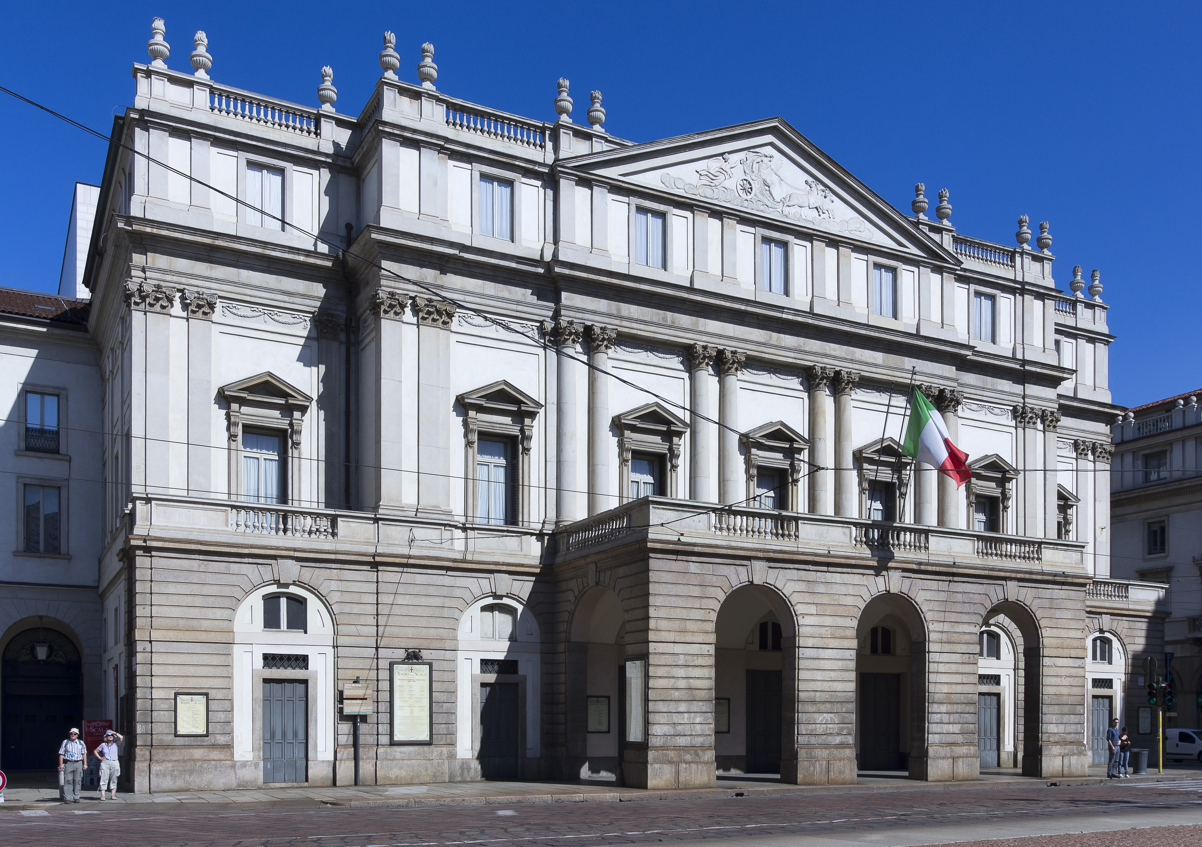 Scala de Milan